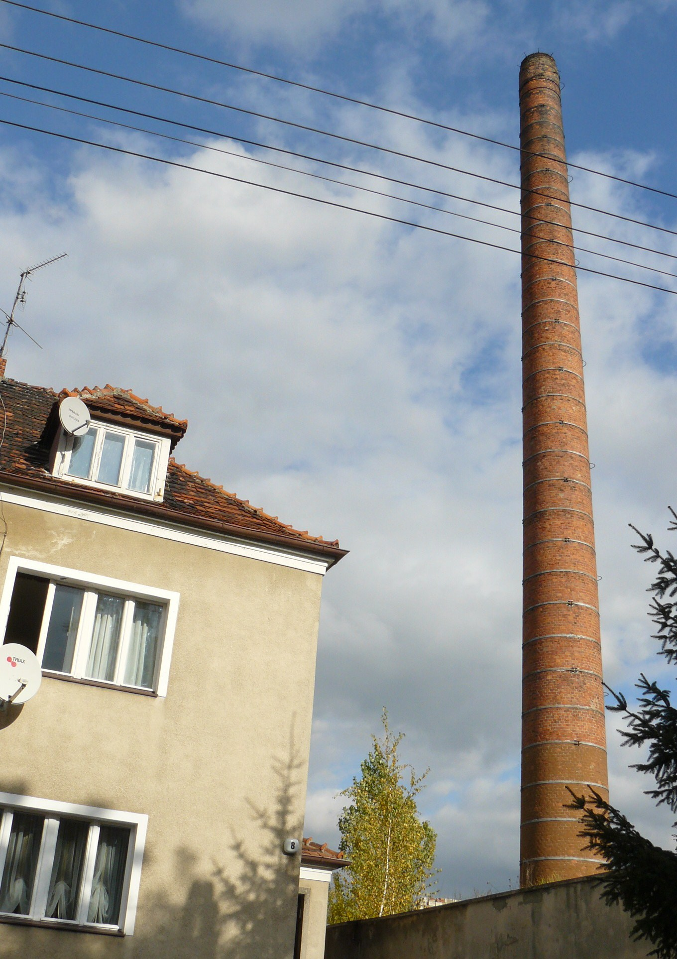 Chimney, Poznań, Żeromskiego street.